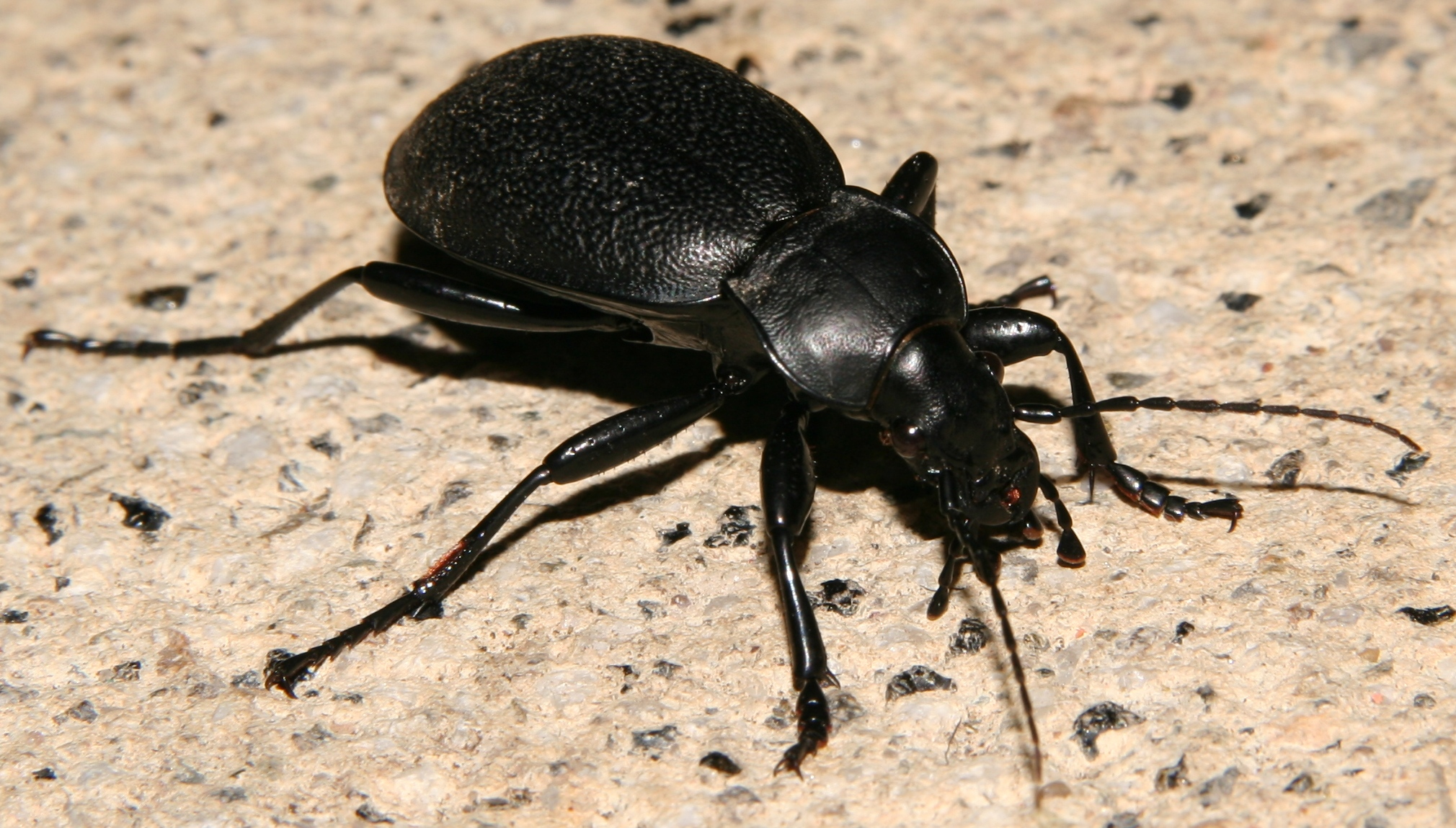 Carabus coriaceus male